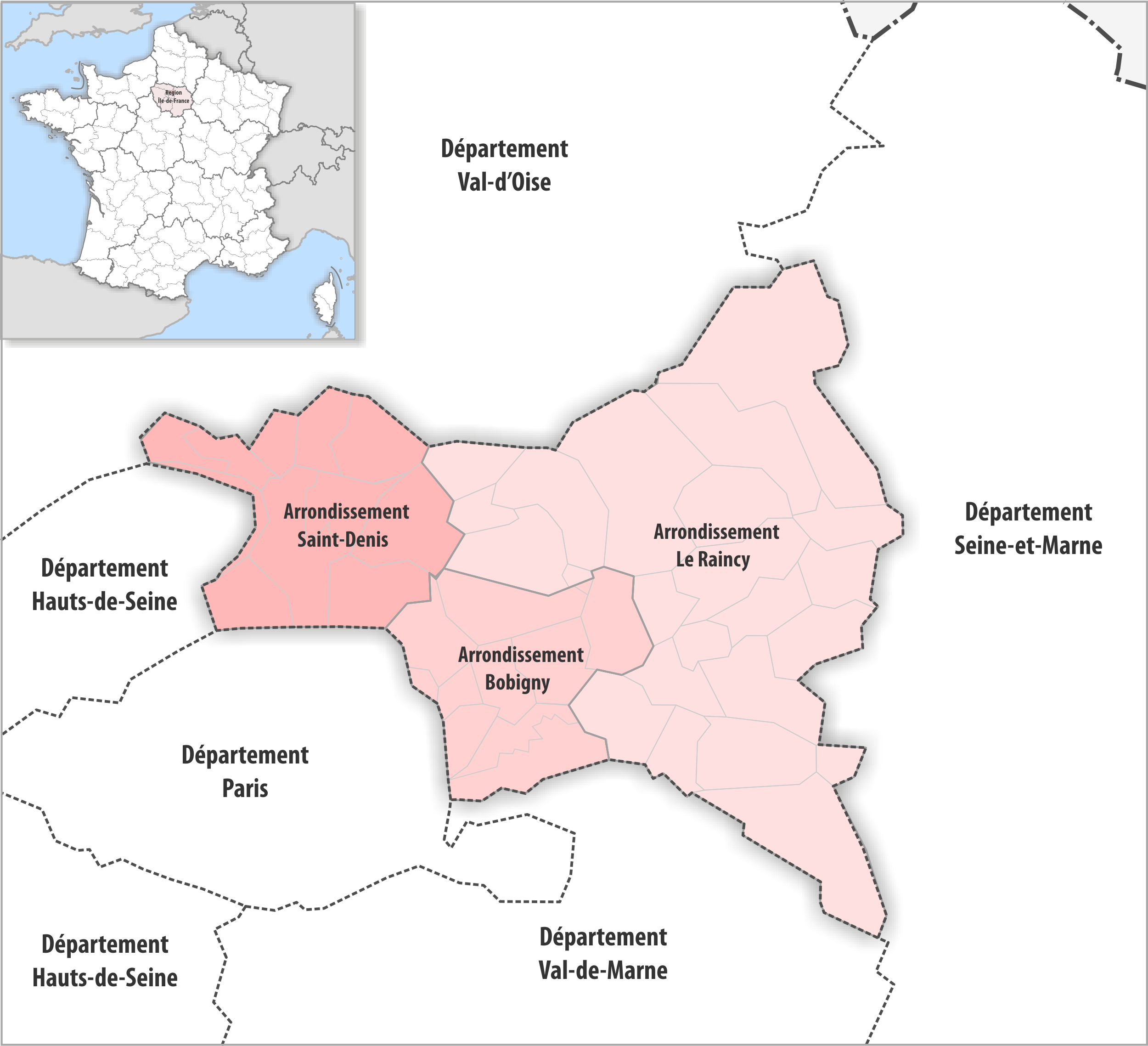 Gemeinden und Arrondissemente im Departement Seine-Saint-Denis